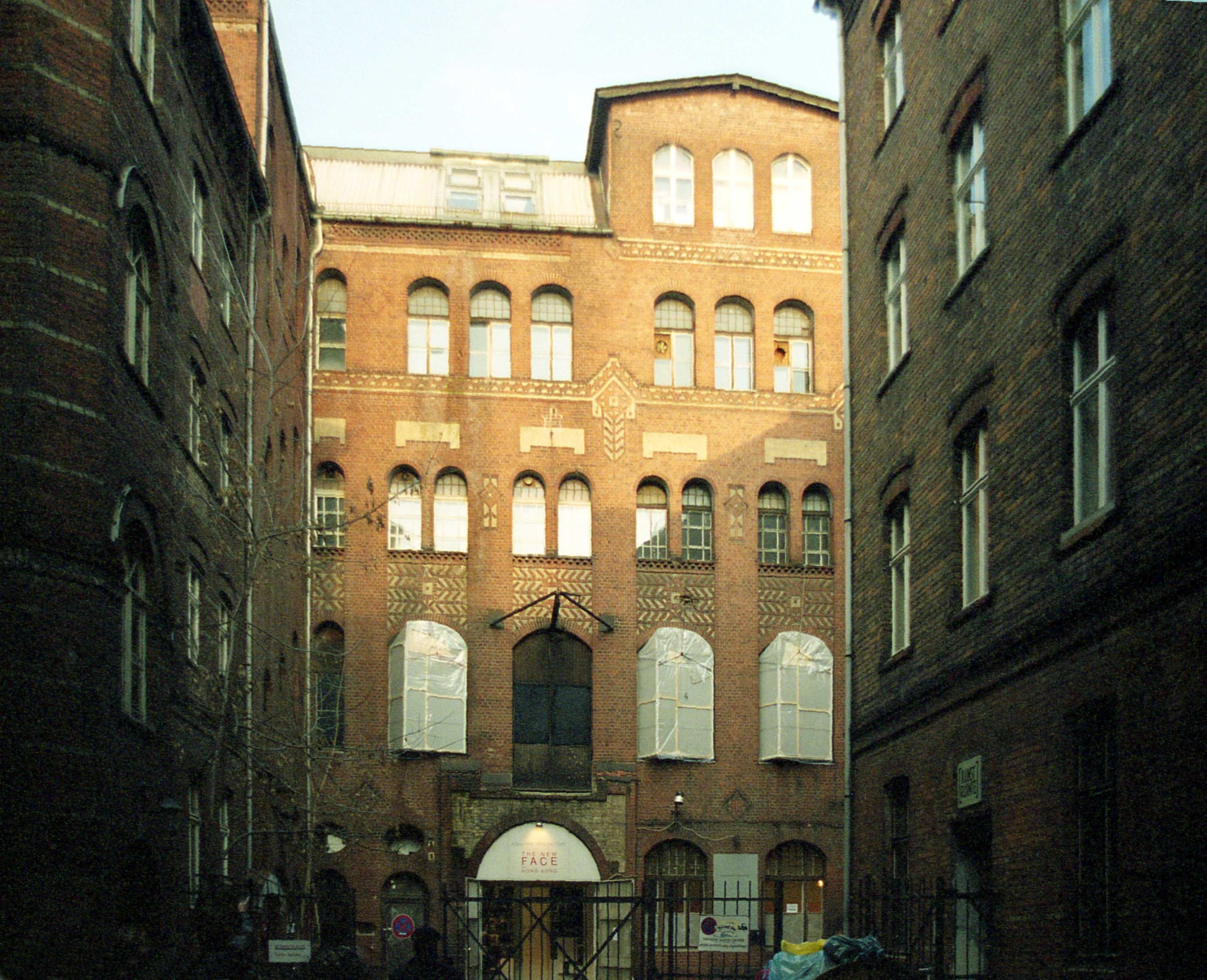 Ortsteil Mitte, Sophienstraße, Handwerkervereinshaus